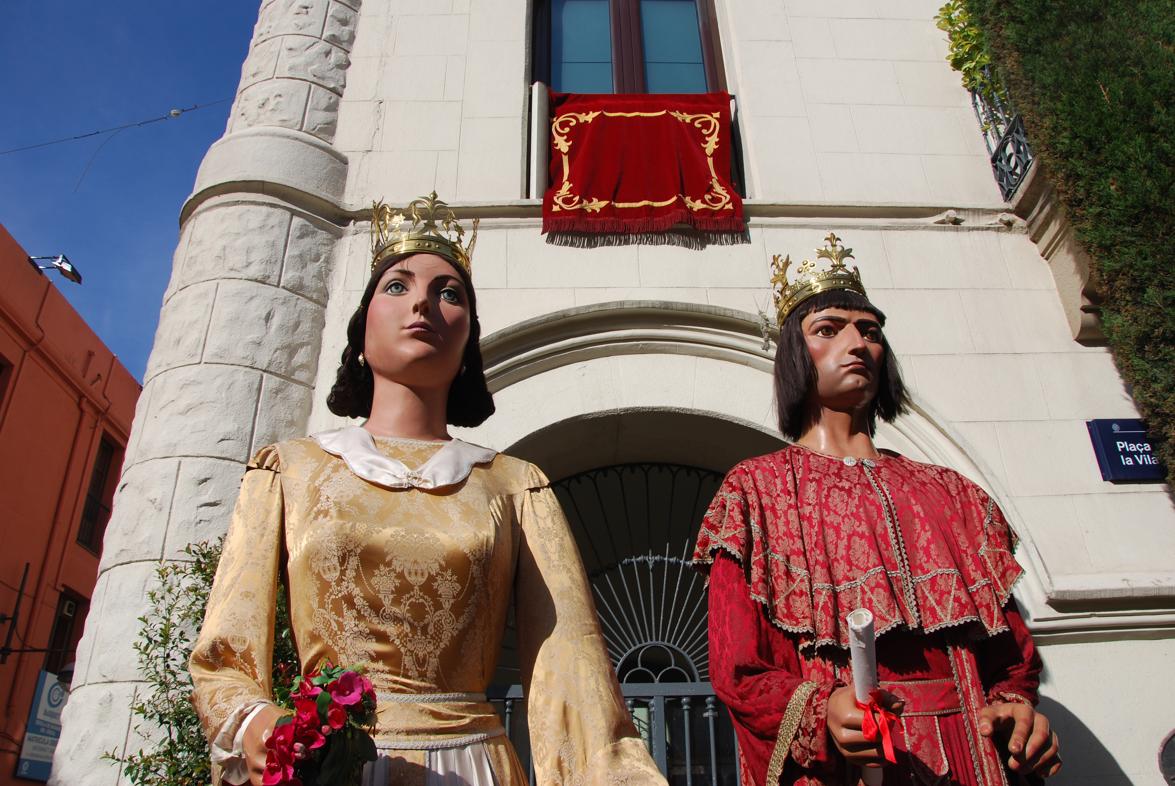 Els gegants "reis" o del "Corpus" de Badalona, en Jeroni i na Badamar